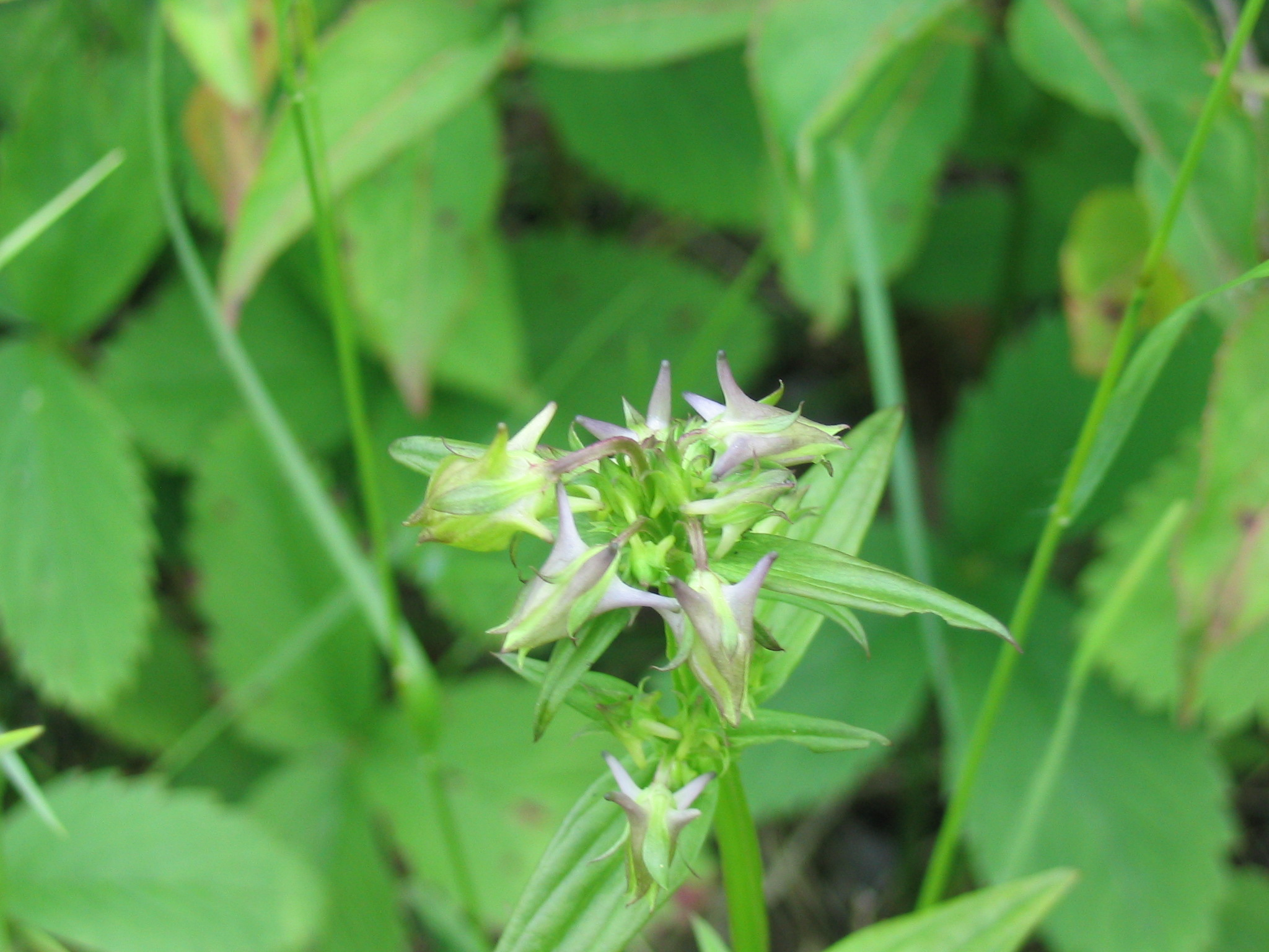 Halenia_deflexa_2-eheep